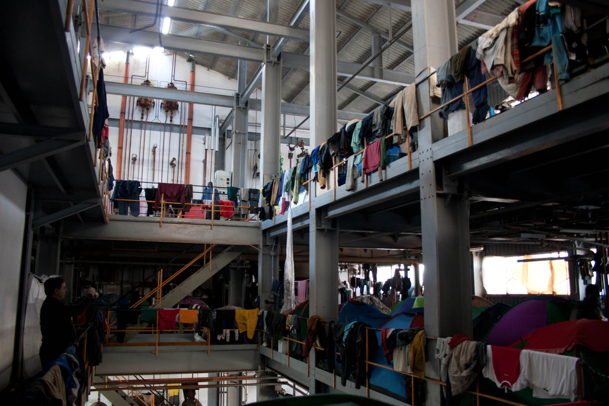 Fino agli scontri del 7 gennaio 2010 l'ESAC, ex Opera Sila, ARSSA era lo stabilimento diventato la più grande baraccopoli per i lavoratori stagionali delle campagne tra Rosarno e Gioia Tauro. Questo "ruolo" era prima affidato alla Cartiera, andata però in fumo e poi murata nell'agosto del 2009. Le condizioni di vita degli abitanti erano pessime. Secondo Medici Senza Frontiere, che per anni hanno seguito i lavoratori stagionali in Calabria, gli africani arrivavano qui in buone condizioni di salute per poi ammalarsi qui cronicamente. 30 dicembre 2009